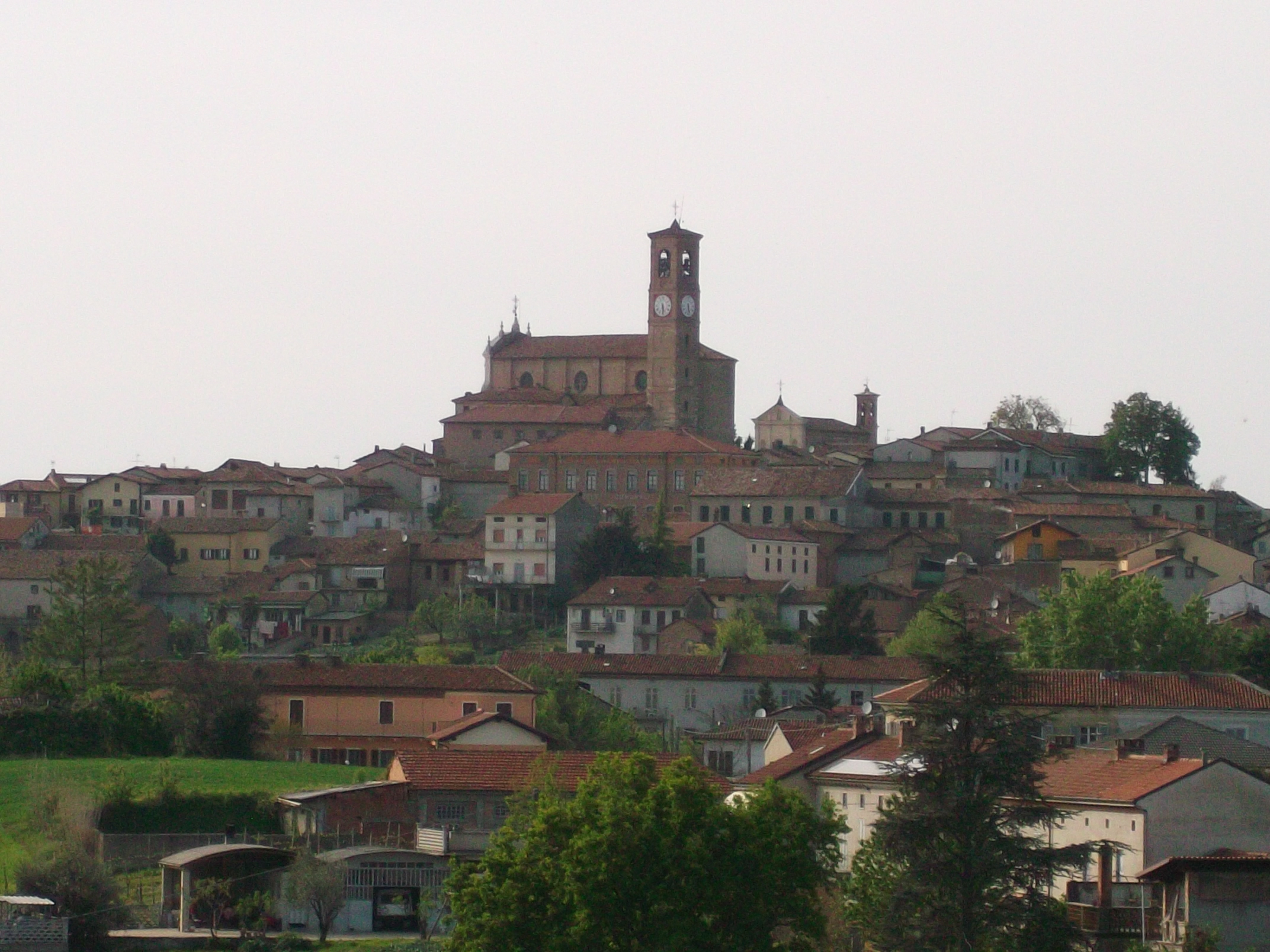 Comune di Grana, provincia di Asti